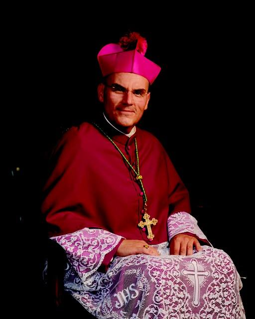 Fotogrfia Ordenacion